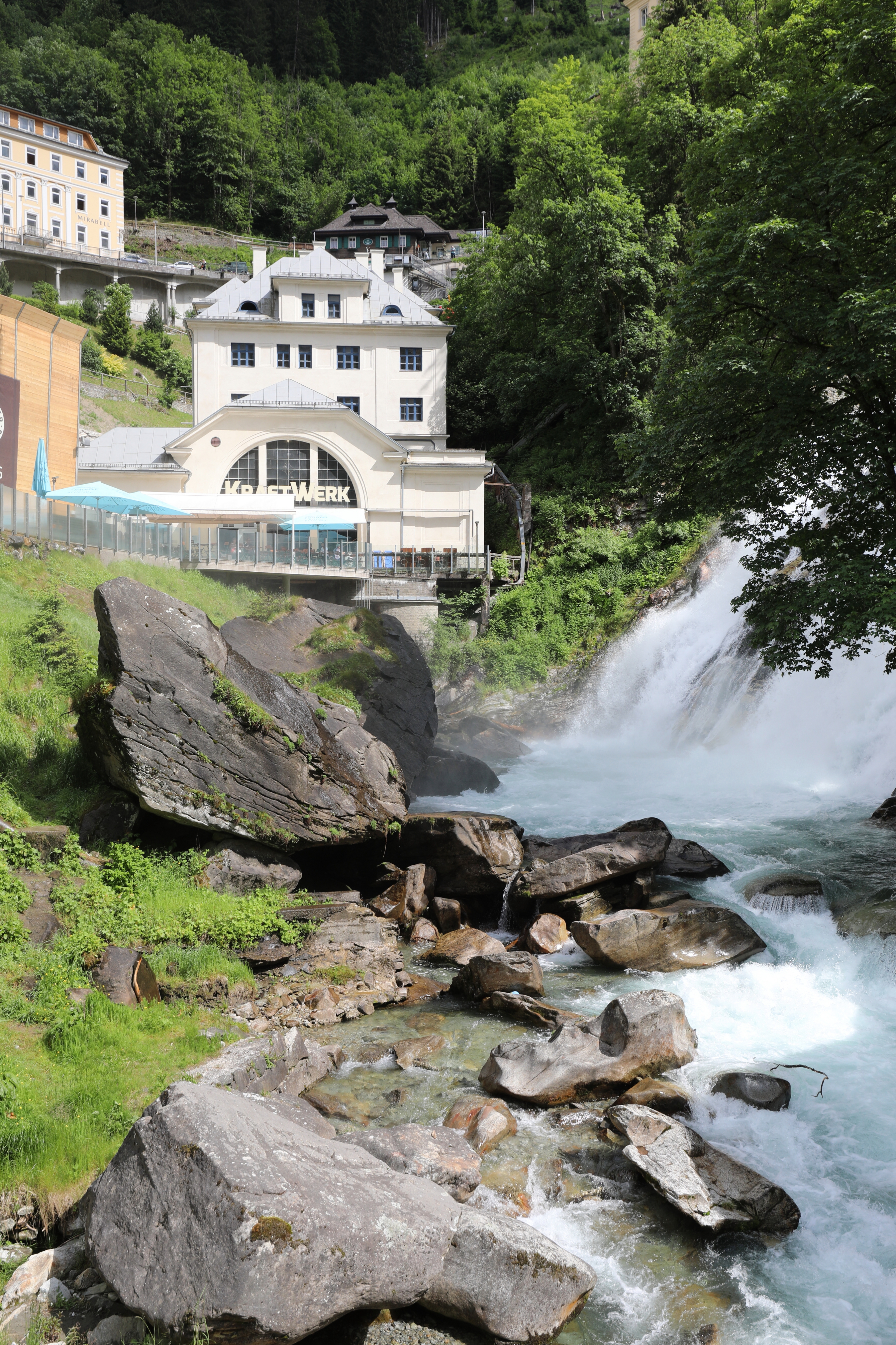 Auslauf der 3. Stufe des Wasserfalls der Gasteiner Ache von Bad Gastein mit dem ehemaligen Kraftwerksgebäude im Hintergrund.Der Wasserfall, direkt im Ortszentrum, ist dreistufig und hat insgesamt eine Fallhöhe von rd. 340 Meter. Das Kraftwerk wurde vom Otto-Wagner-Schüler Leopold Führer geplant und 1914 errichtet. 1996 wurde es stillgelegt und 2004 unter Denkmalschutz gestellt. Aktuell (Stand 2020) wird das Gebäude als eine Art kleines Museum und für die Gastronomie genutzt.